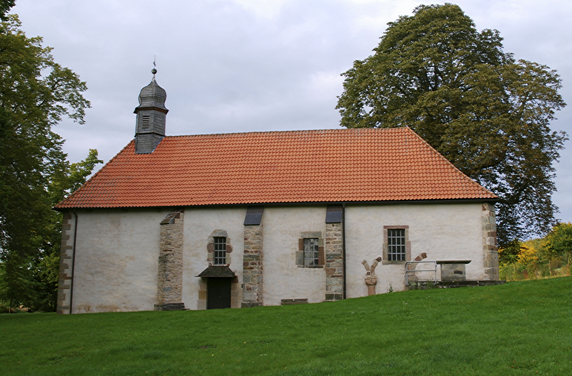 Südfassade der Wittmarkapelle im Twistetal an der Landstraße zwischen Volkmarsen und Welda, Volkmarsen, Hessen, Deutschland.